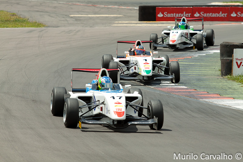 Ultima etapa da Fórmula Futuro 2011 em Nova Santa Rita, RS.